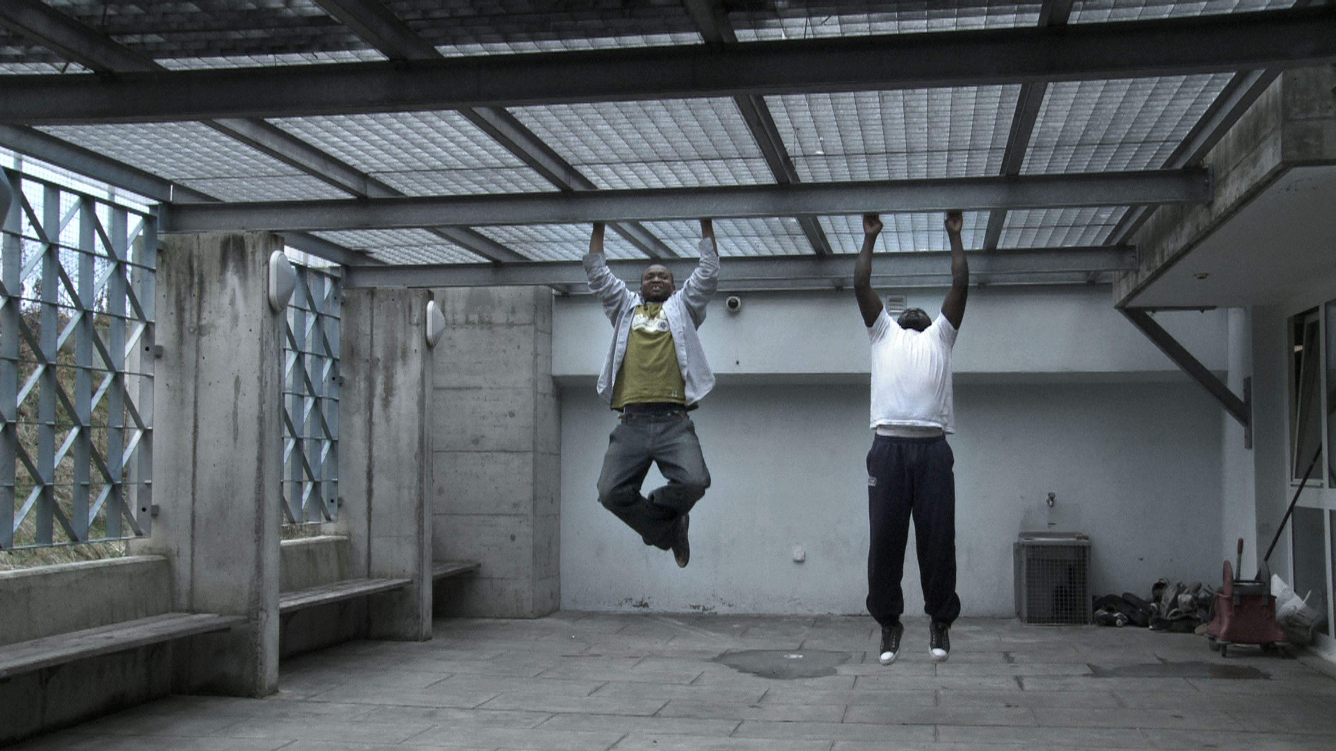 Julius et Blacky, protagoniste du film « Vol Spécial » de Fernand Melgar, font des exercices dans la cour de la prison de Frambois à Genève.